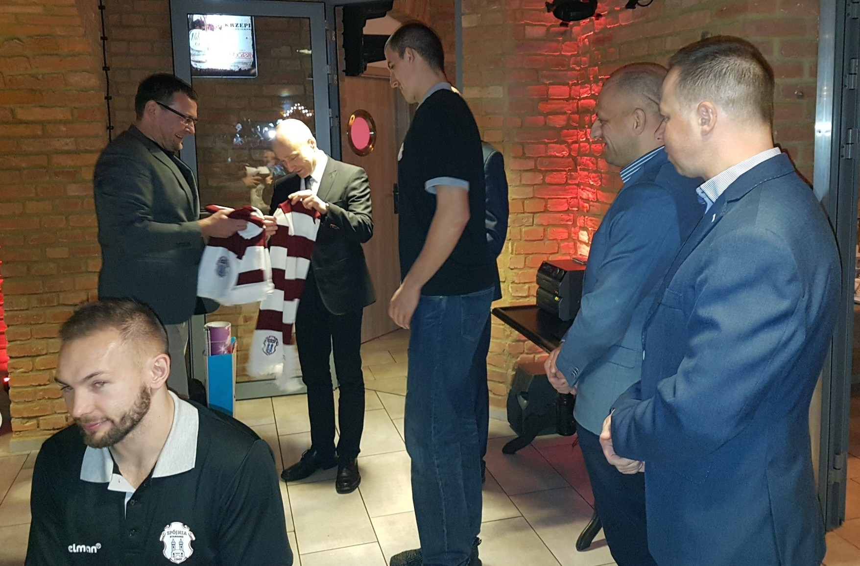 Prezydent Zając uchonorowany barwami klubu (20.12.2018)